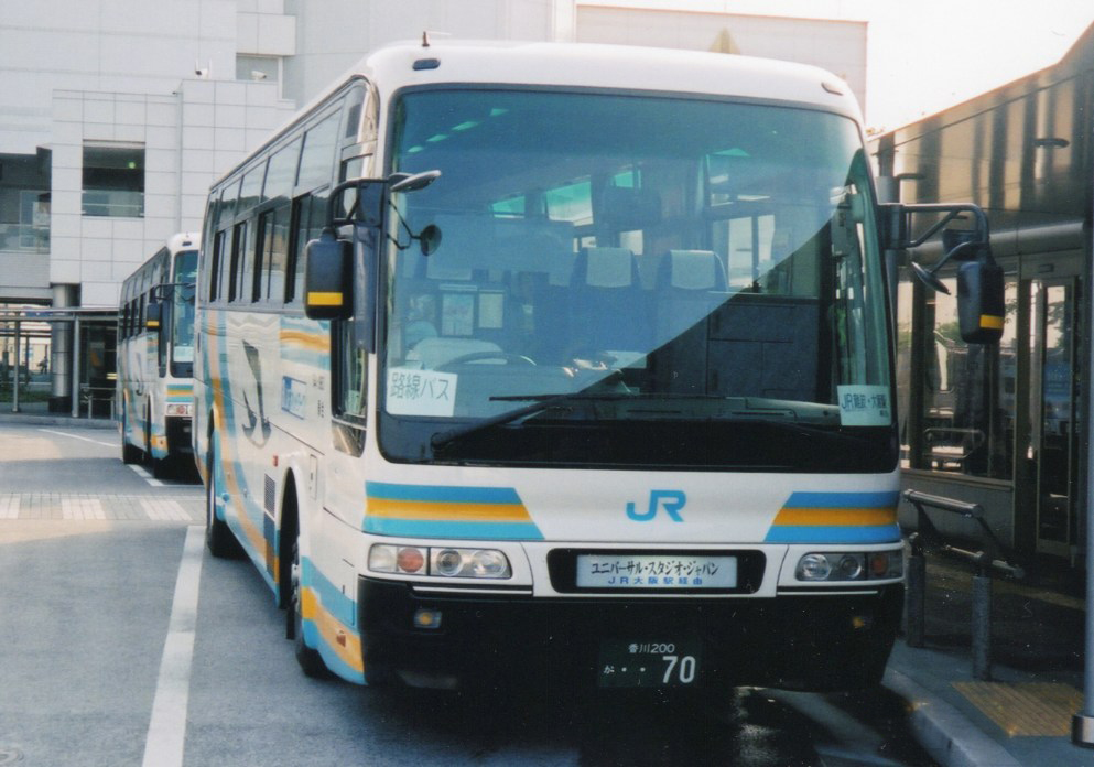 JR Shikoku Bus 644-0963 Mitsubishi KL-MS86MP at Takamatsu Sta.